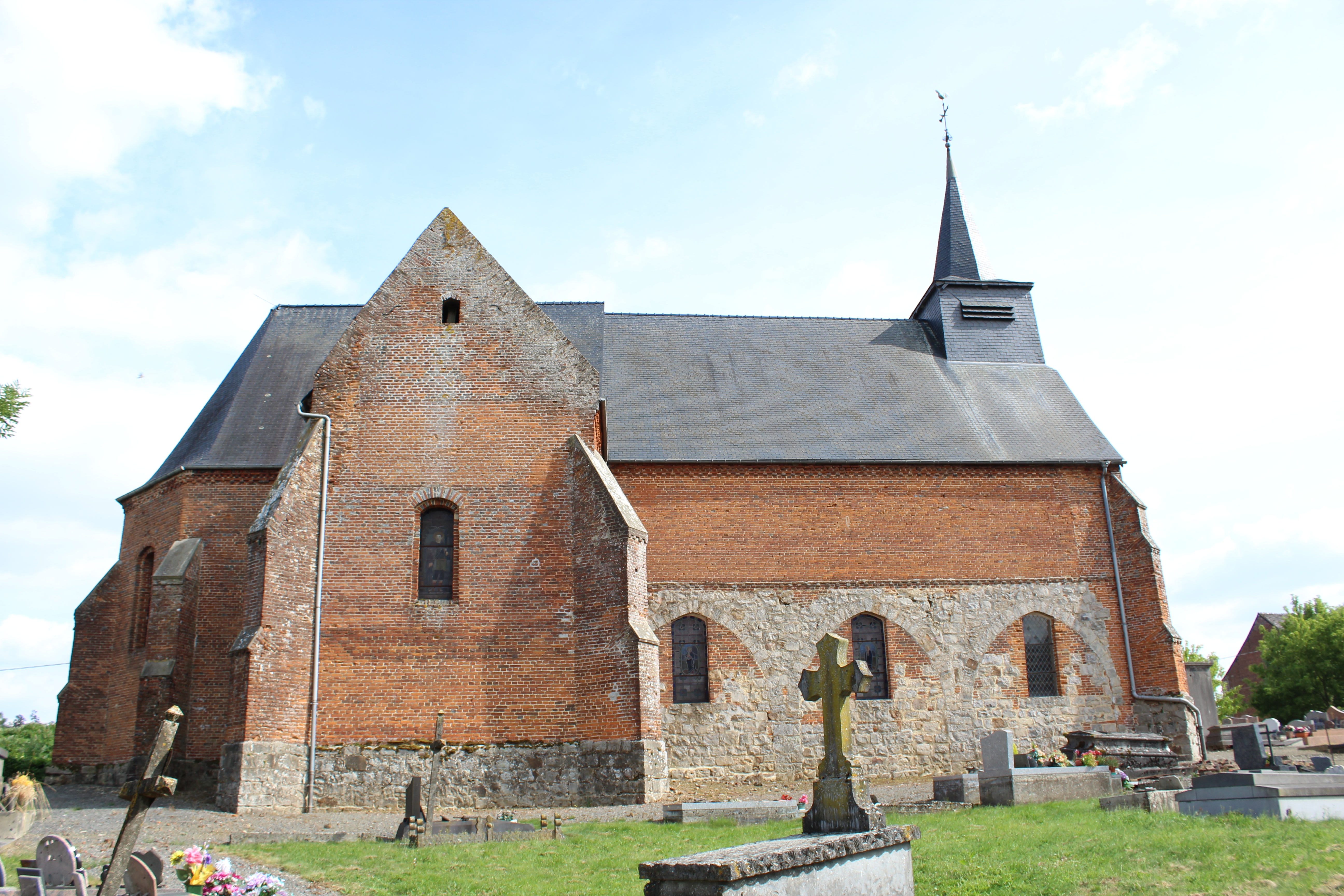 L'église